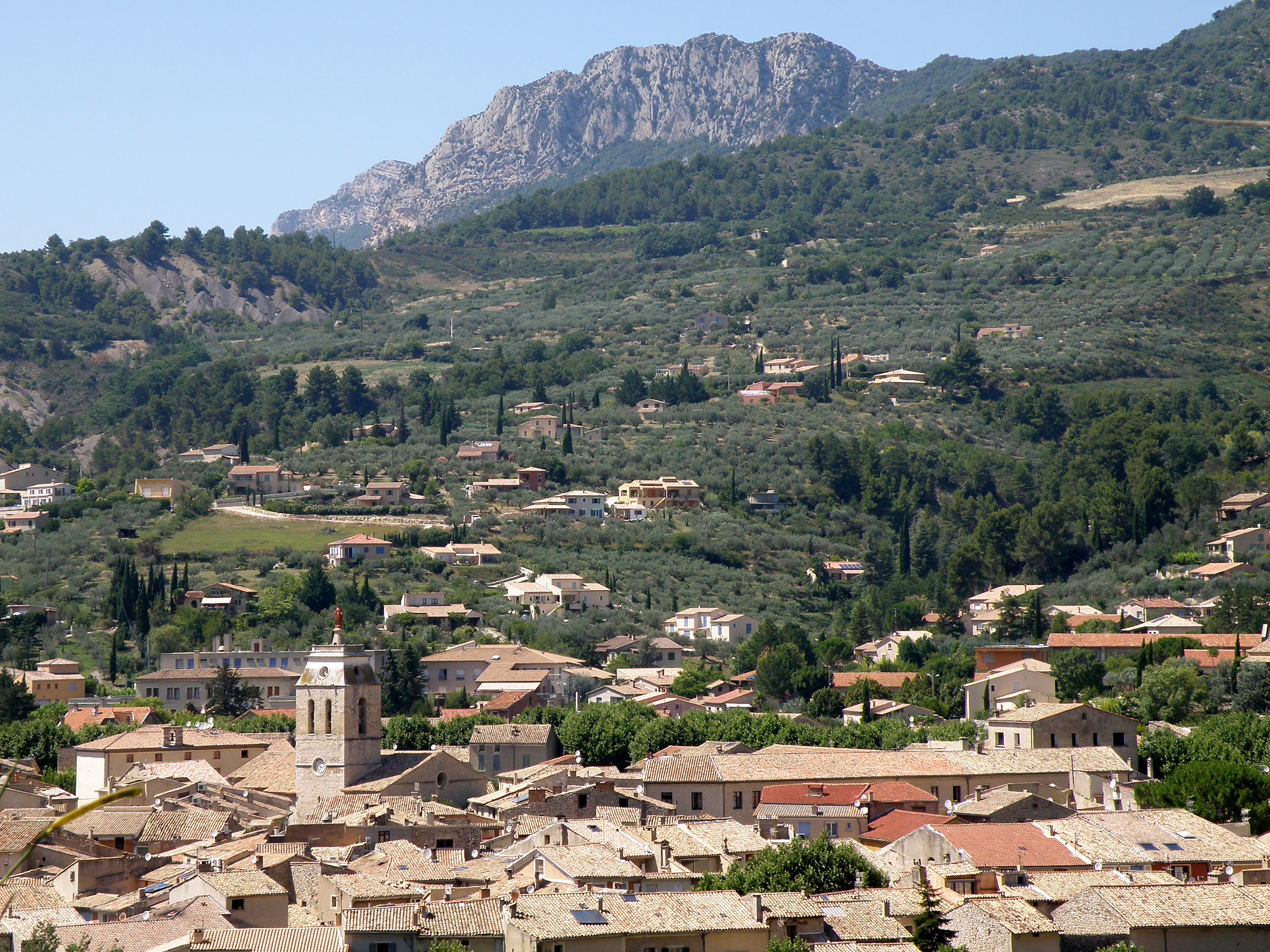 Buis-les-Baronnies (Drôme, France). Vue générale. Nous regardons grosso modo vers le nord-ouest.